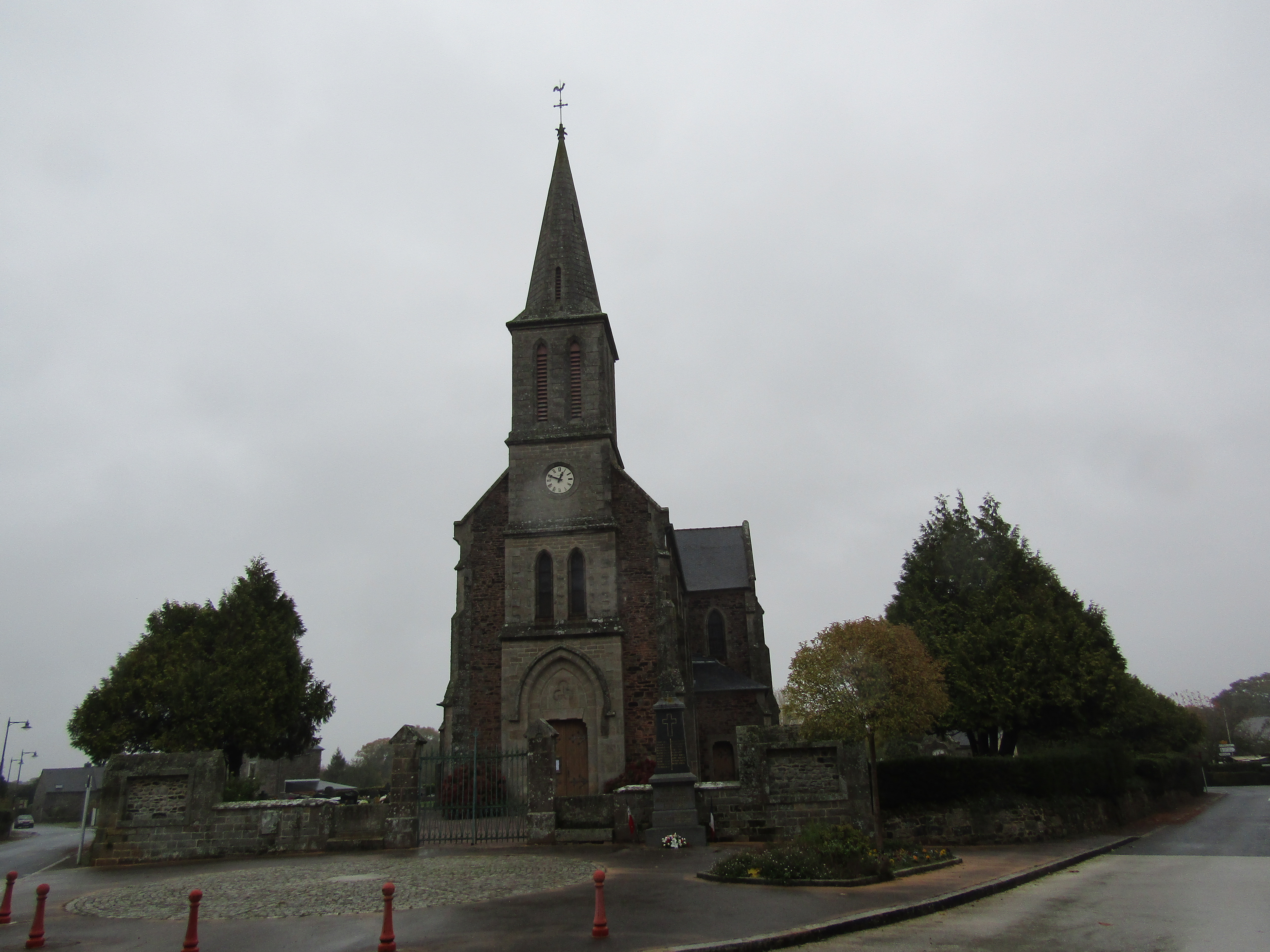 Eglise Saint-Pierre de Quintenic